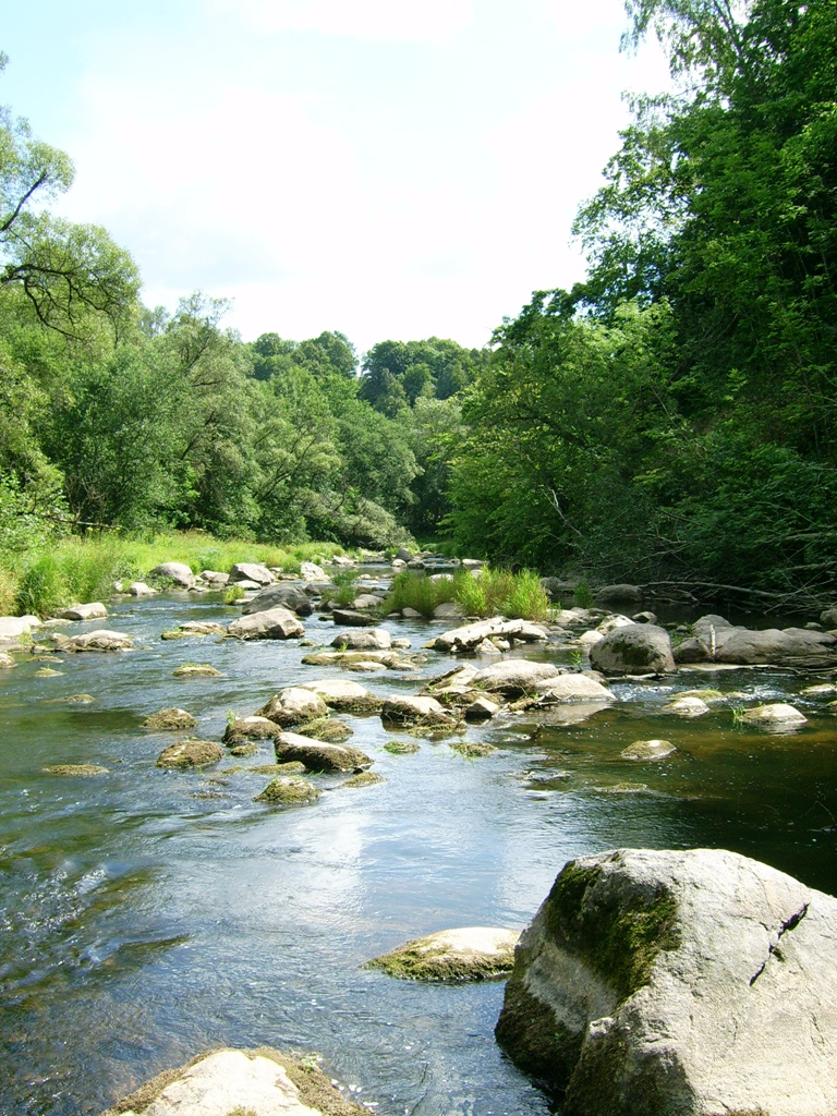 Didžioji Akmenos rėva